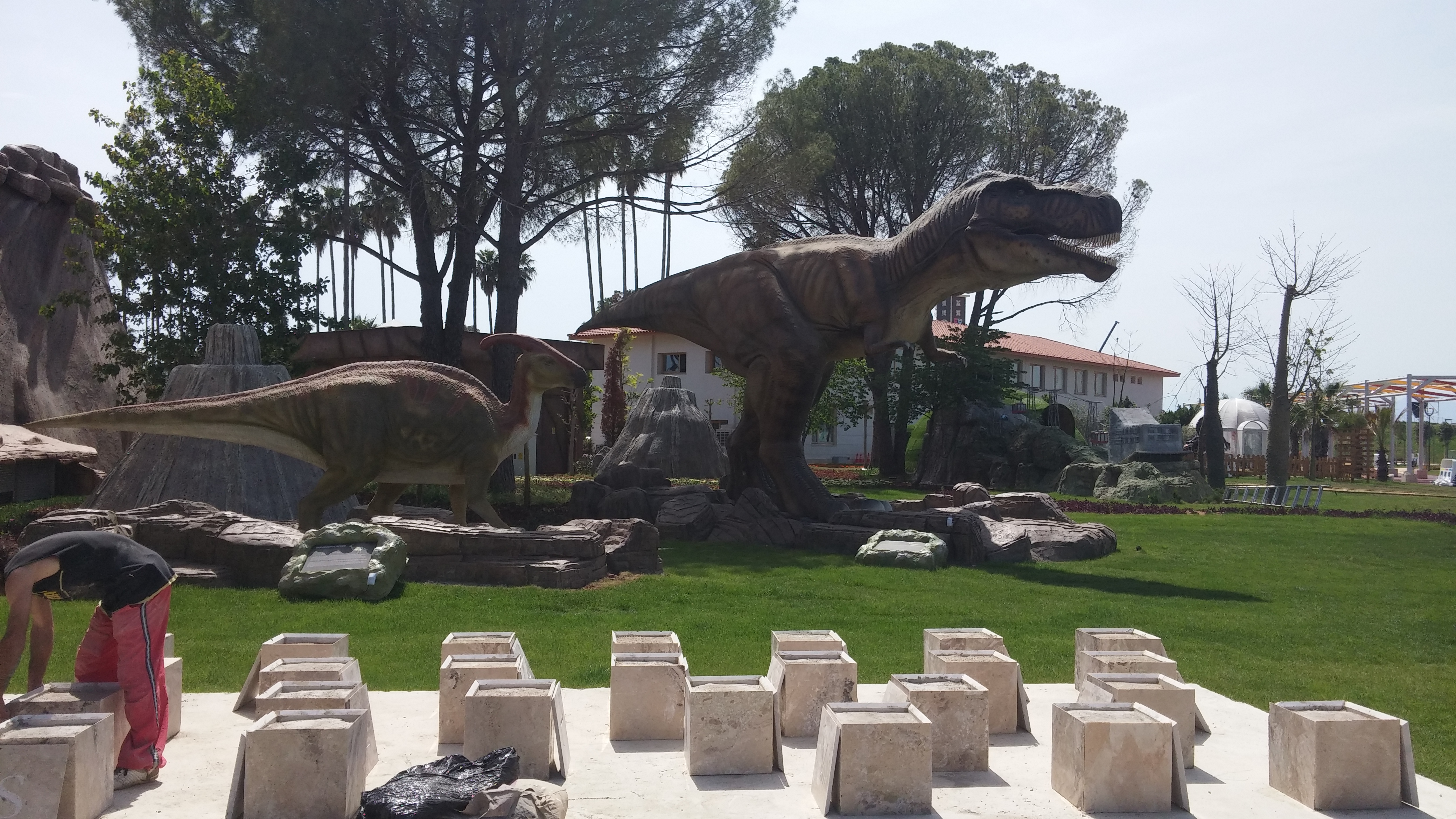 Çocuk Bilim ve Teknoloji Merkezi'nin önündeki dinozor maketleri.